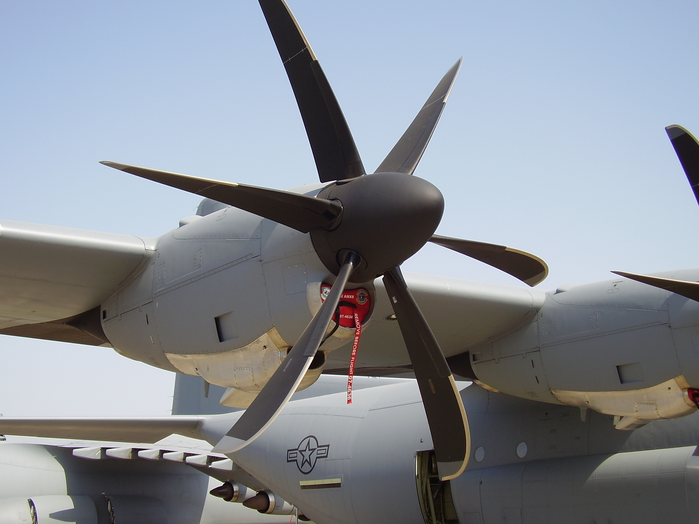 ILA 2008